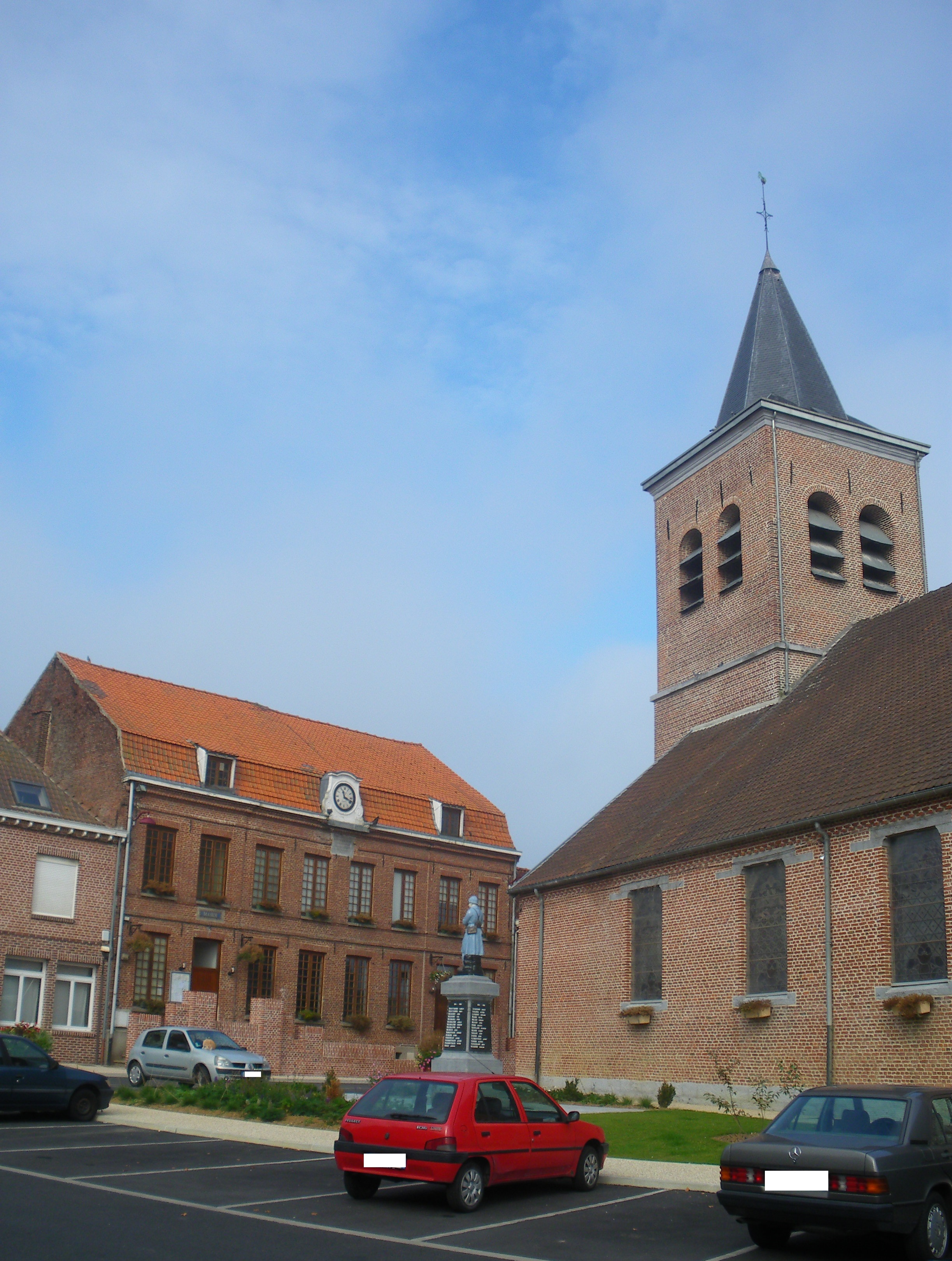 Vue du centre-ville de la commune de Camphin-en-Pévèle : mairie, monument aux morts et église Saint-Amand.